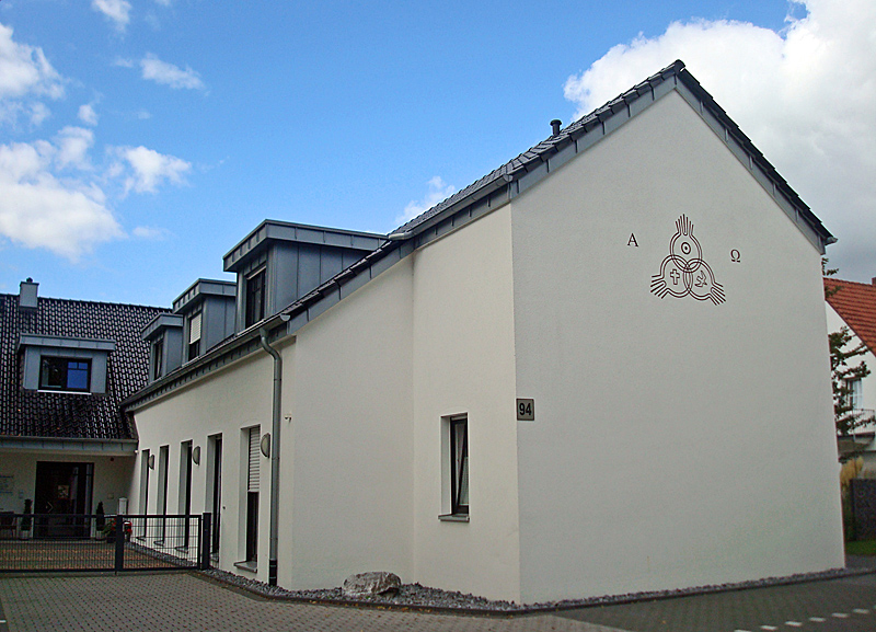 ehemalige Trinitatiskirche (bis 2007) in Gütersloh, heute Pflegewohngemeinschaft